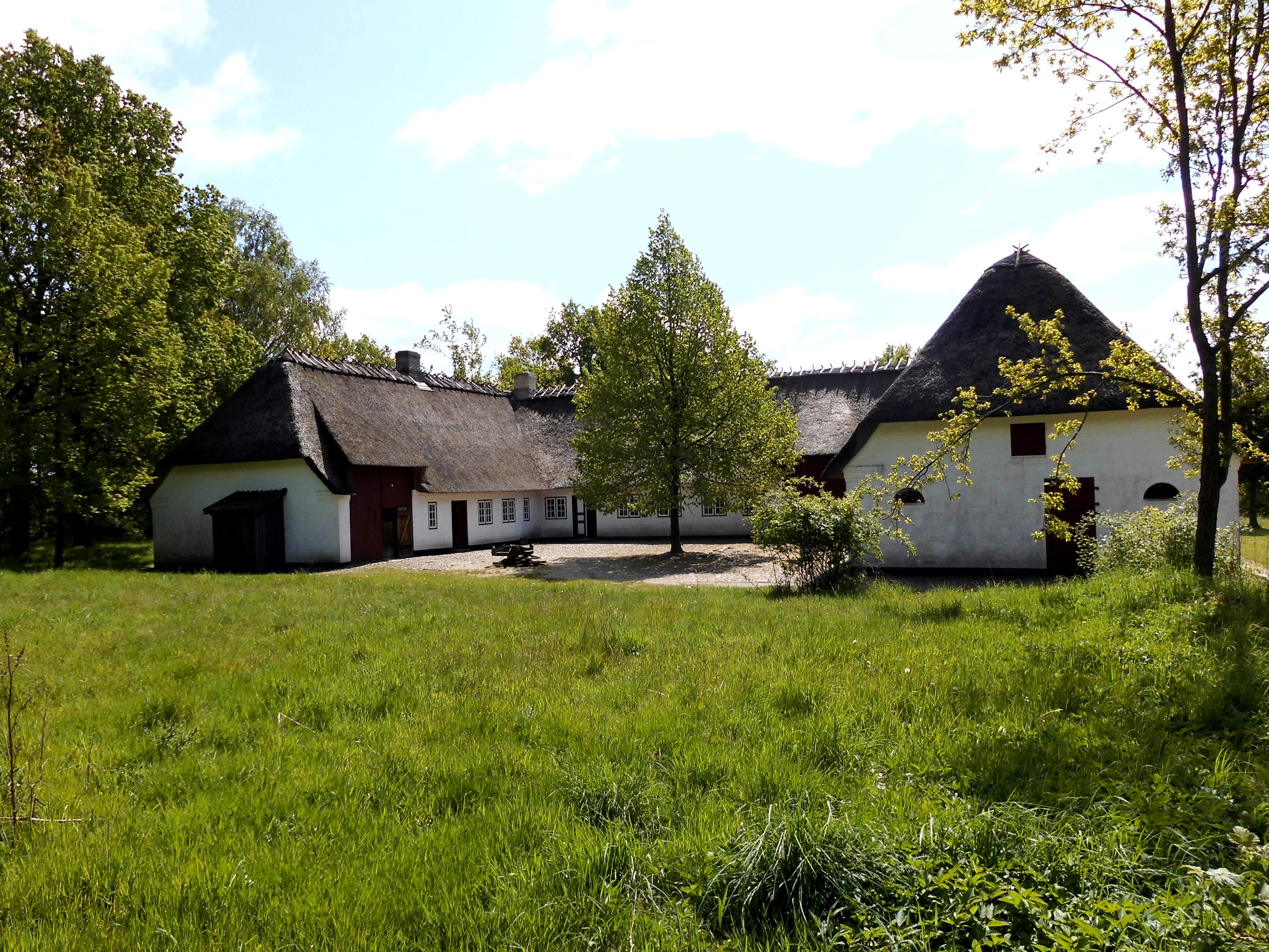 Dreiseithof aus Quars (Kommune Sonderborg, Dänemark). Erbaut 1806, Wiederaufbau 1982.